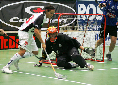 Na této fotce je David Janda